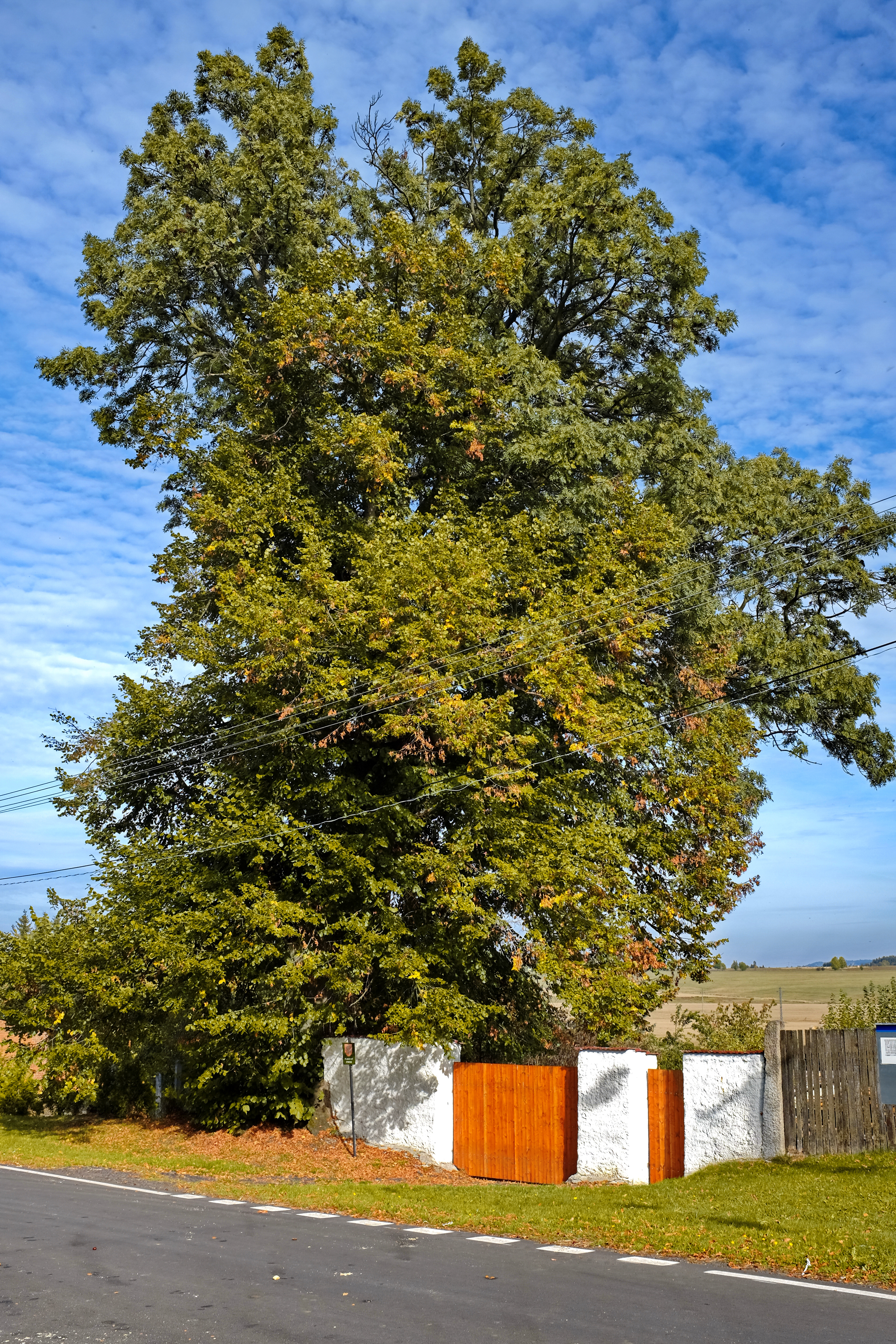 Památný strom - Lípa v Odolenovicích, okres Karlovy Vary